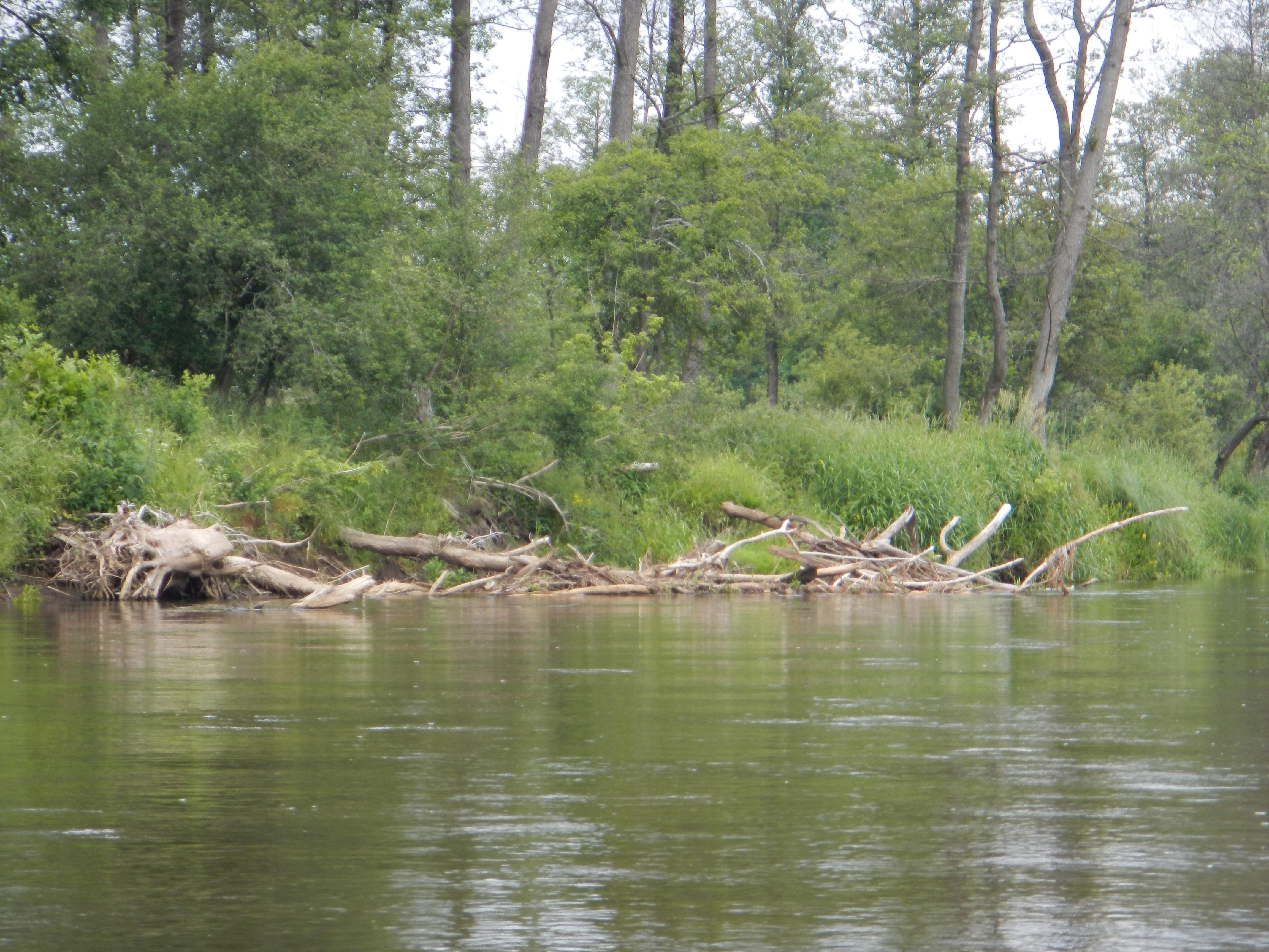 Gmina Łochów, Poland